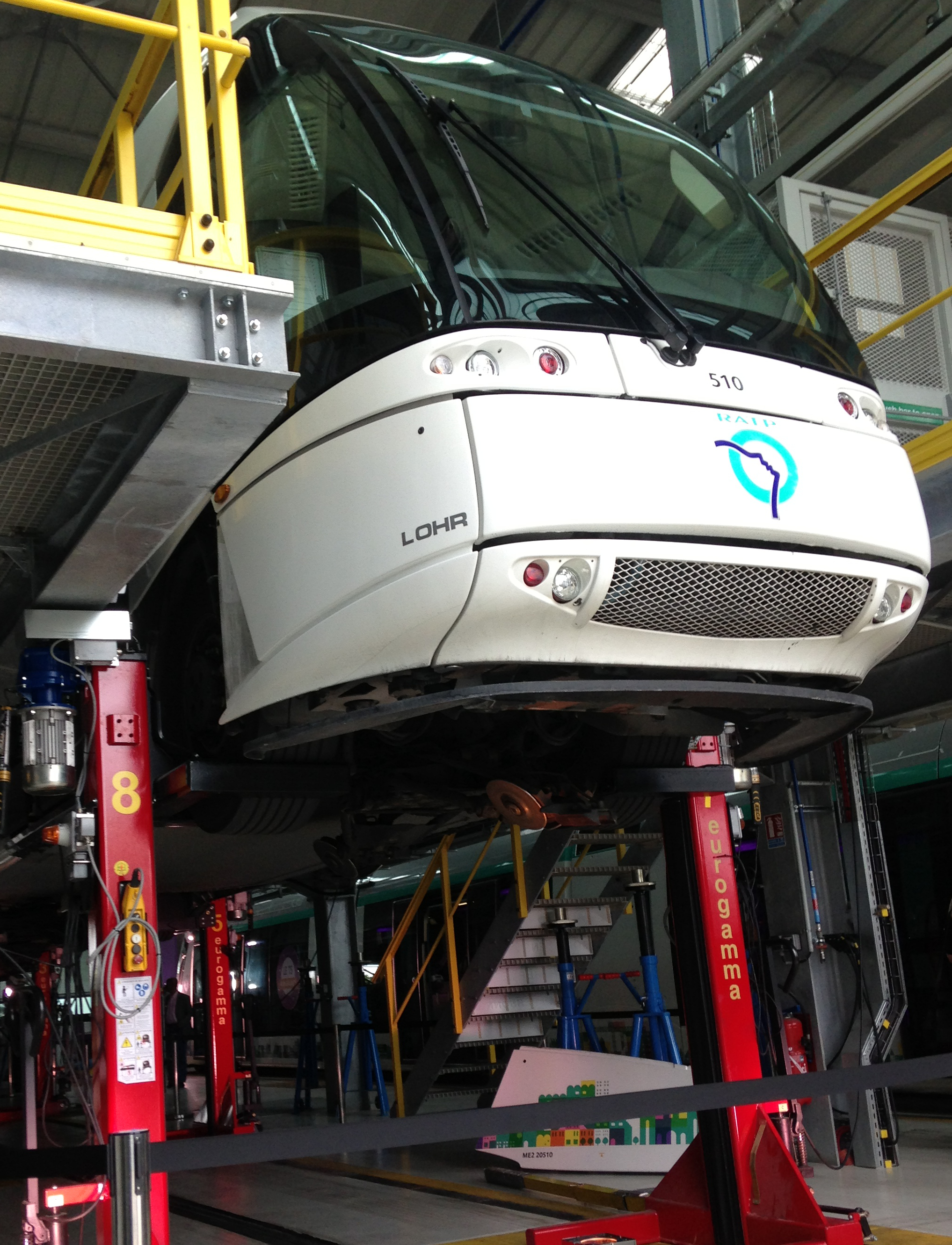 Tramway Translohr STE3 monté sur un pont au centre de remisage de Pierrefitte.